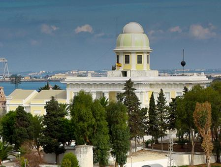 Fotografía del Observatorio de la Armada